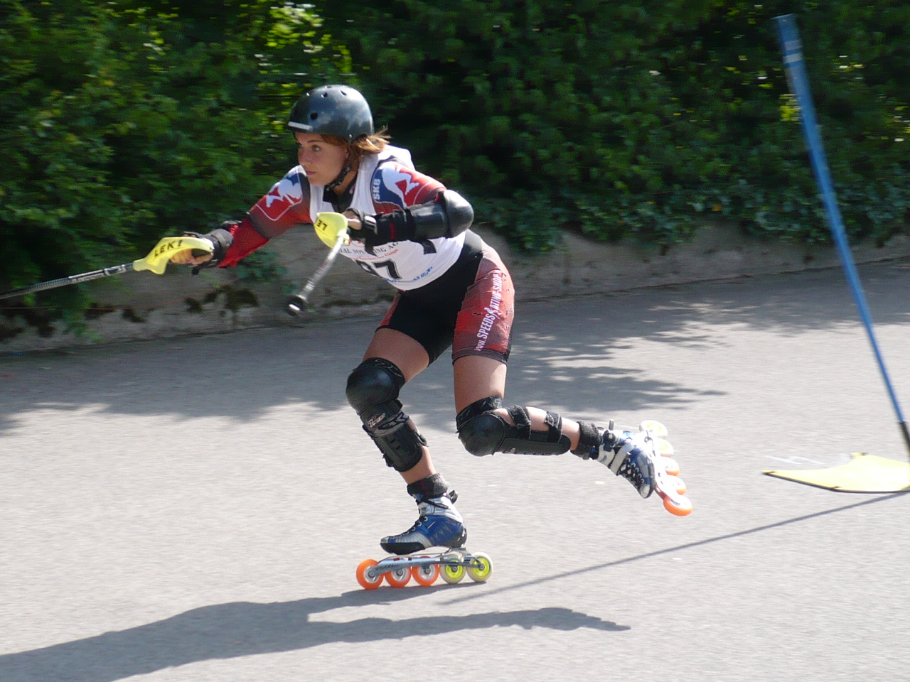 Meisterschaft im Inlinesakten Slalom in München am 28.06.2008